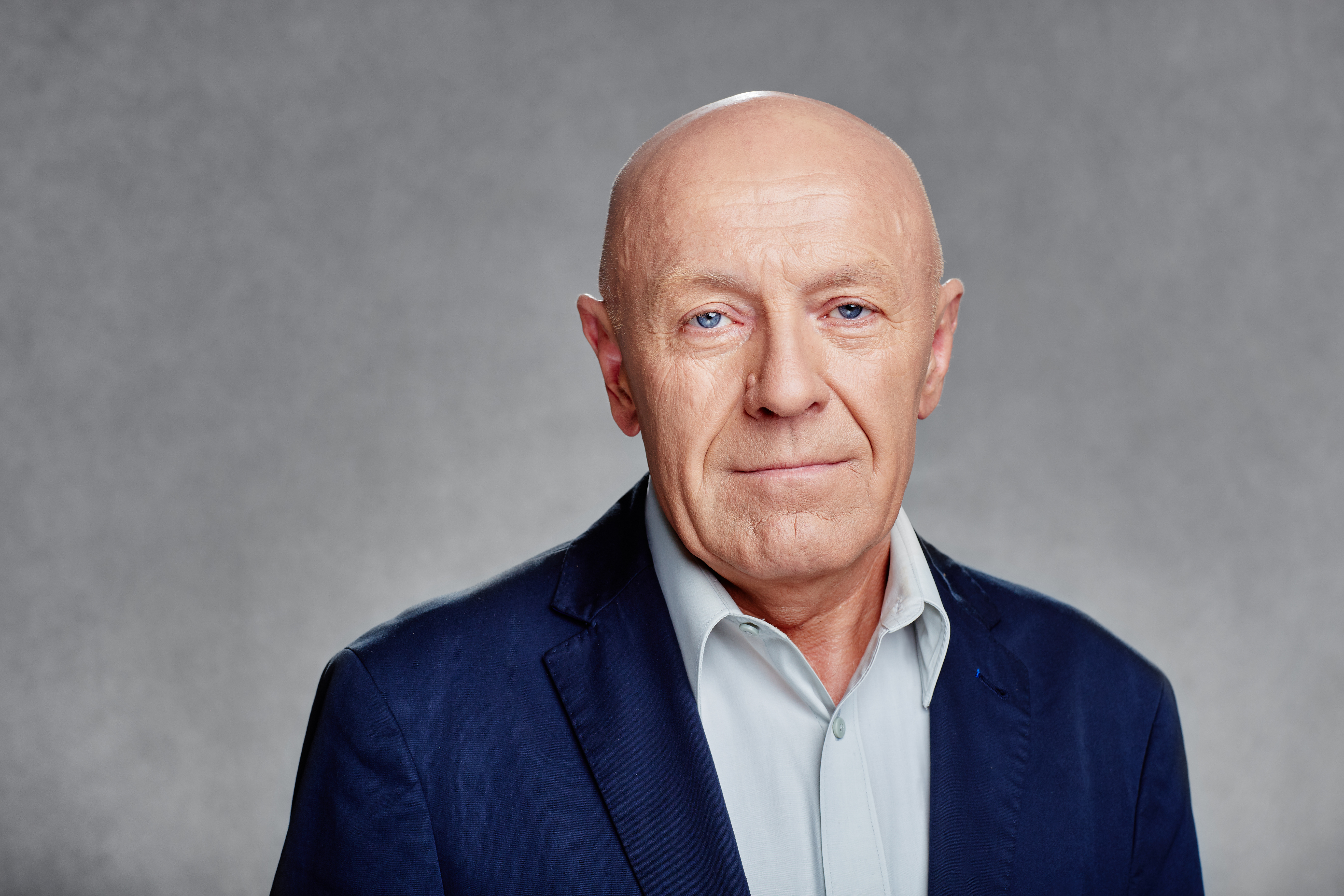 Redaktor prowadząca sekcję Prawo dla każdego w portalu Prawo.pl